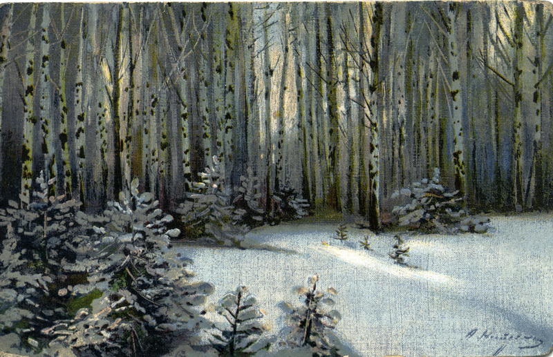 Парк в имении Мамонтовых Киреево (возле Химок под Москвой)